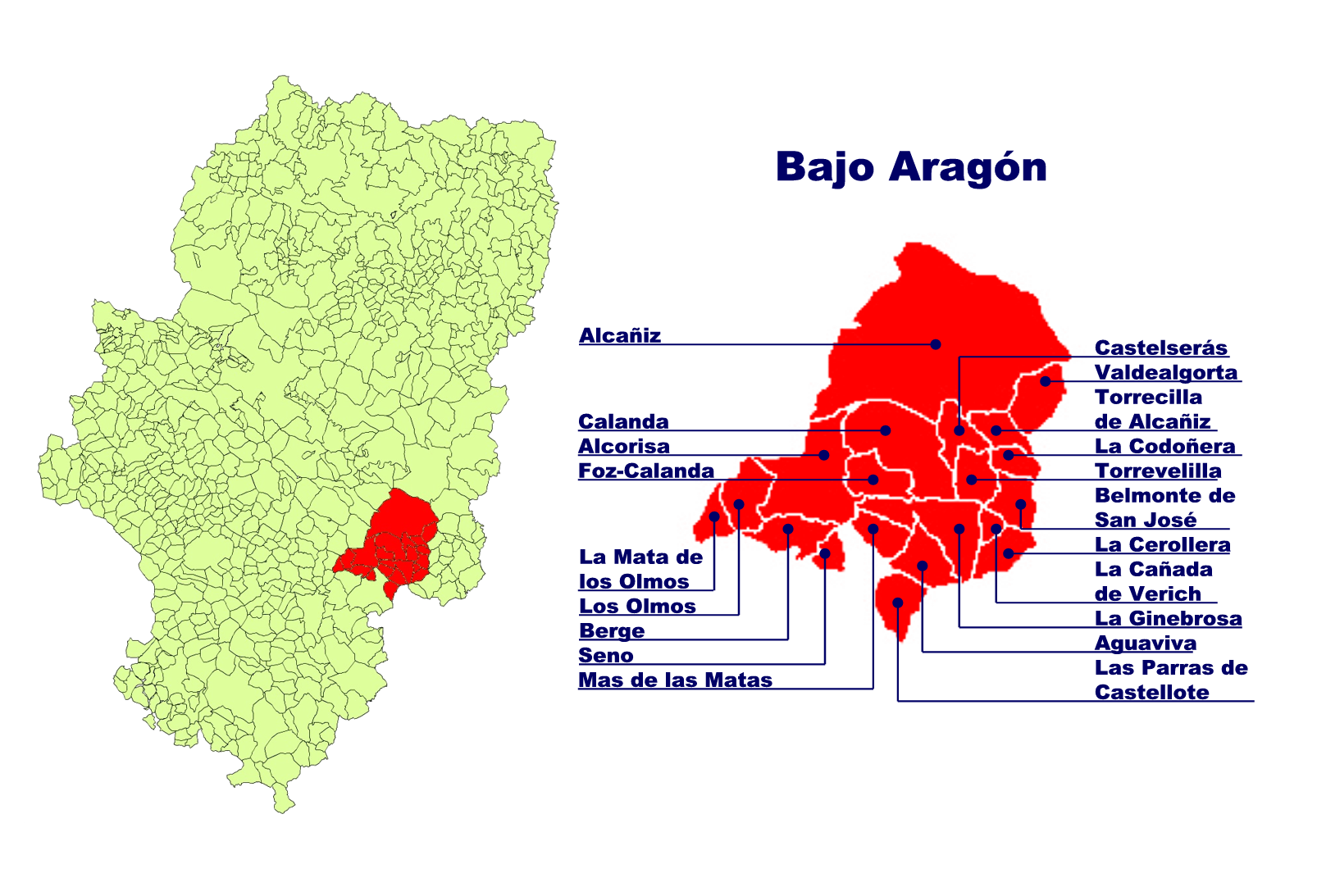 Comarca del Bajo Aragón Creado el 06.11.2005 por Ecelan en base a Image:Aragon municipalities.png